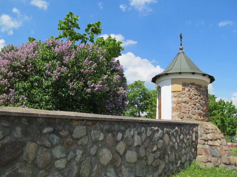 Пачапава. Пакроўская царква